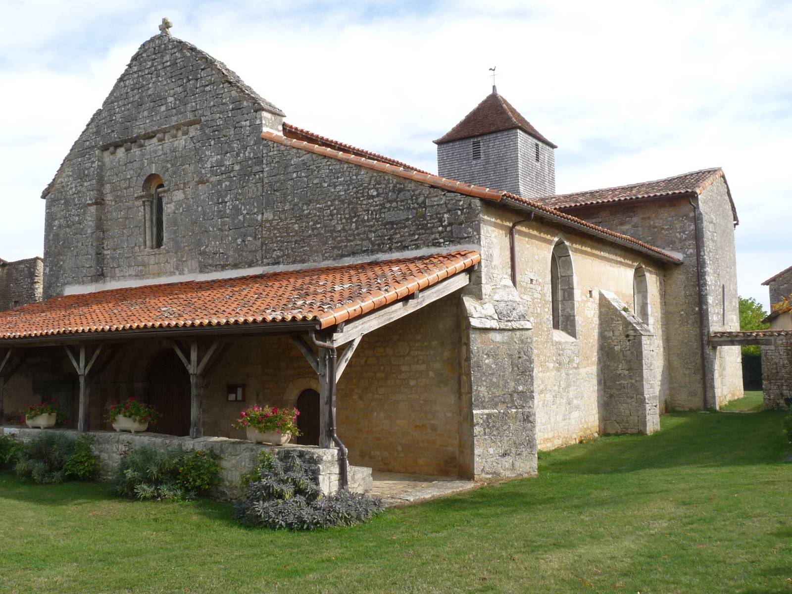 église de Poursac, Charente, France